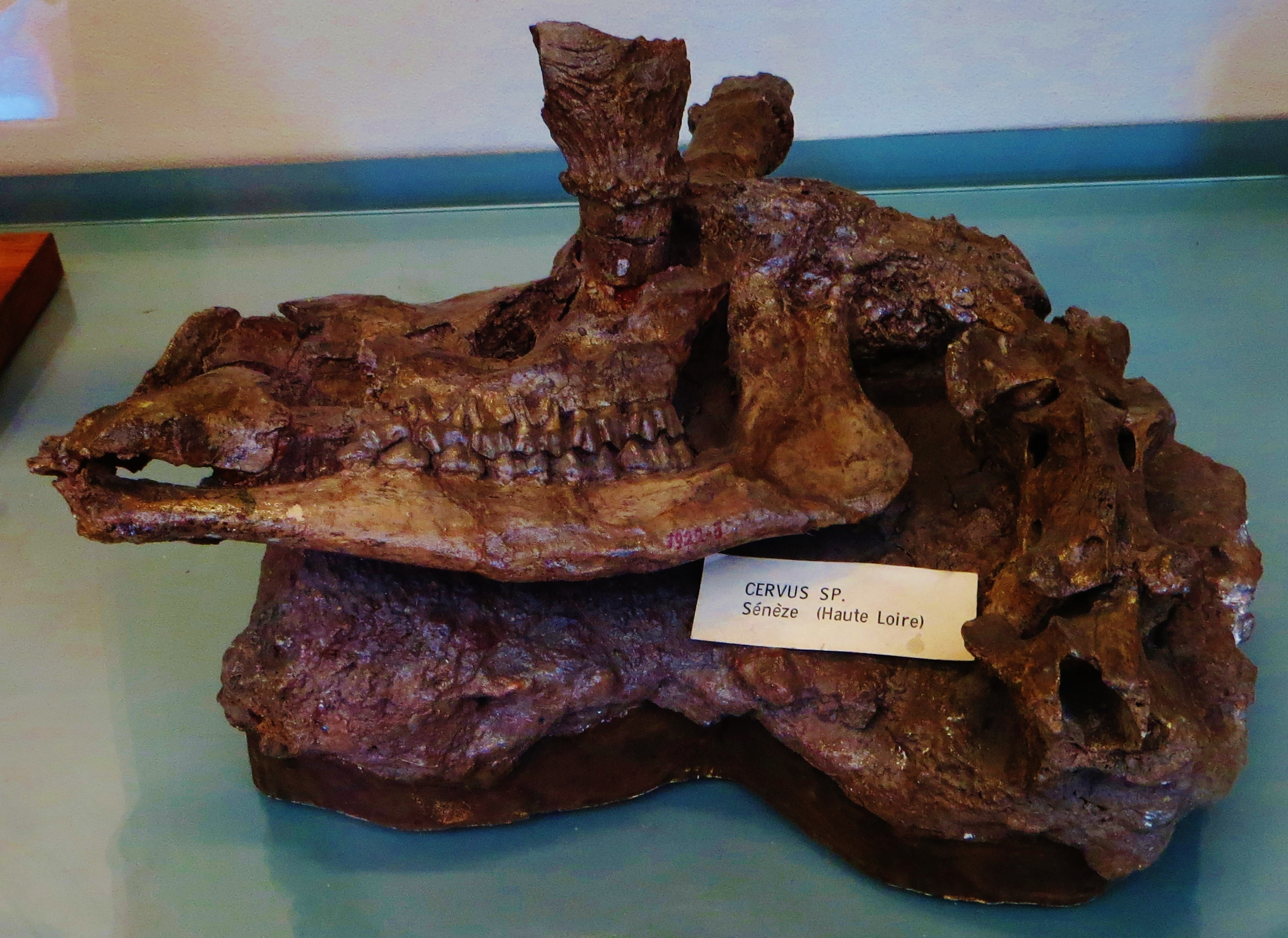 Fossil of Cervus philisi, an extinct mammal- Took the photo at Musee d'Histoire Naturelle, Paris